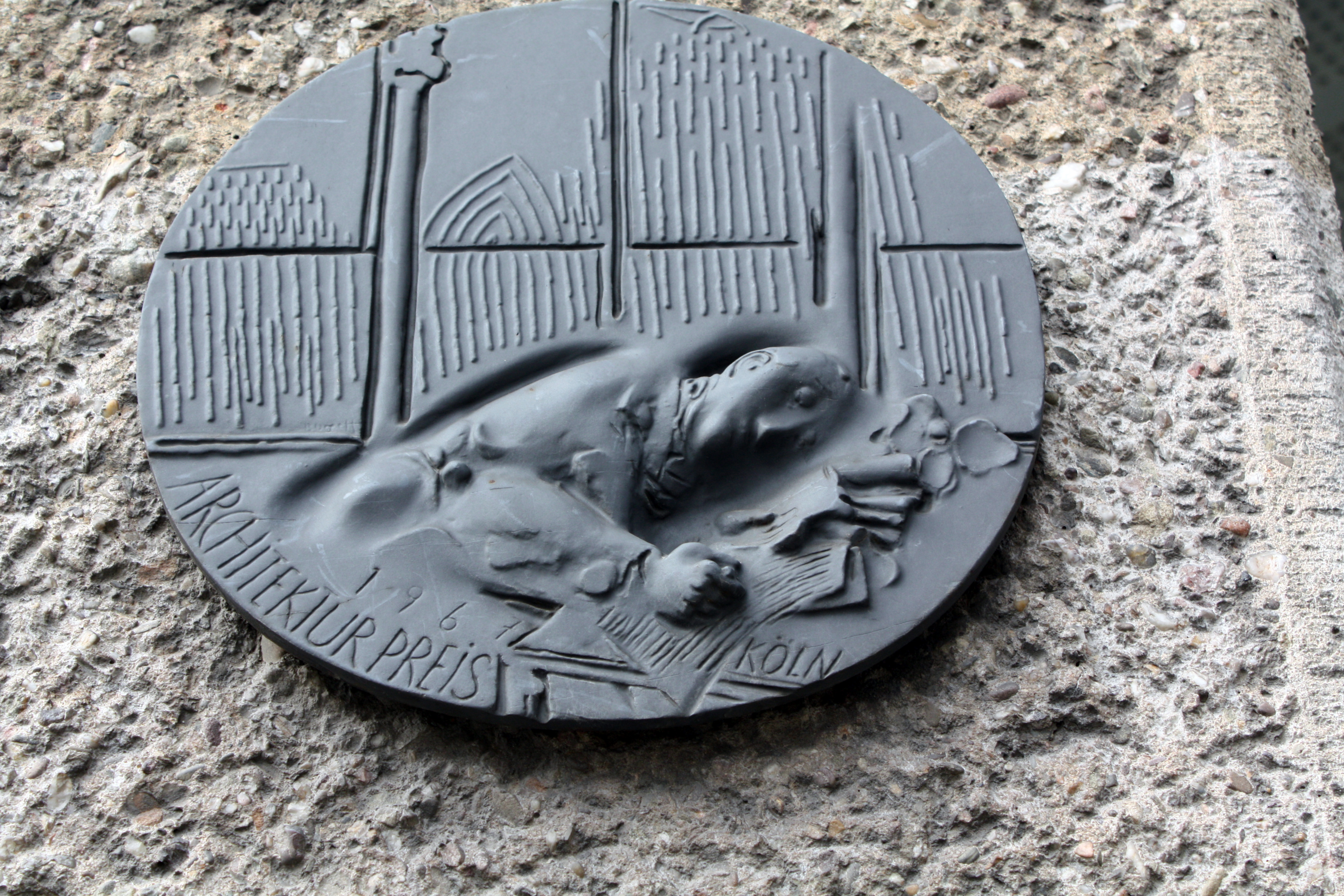 Köln Domforum, Architekturpreis 1961